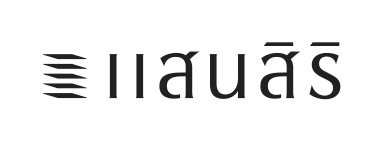 sansiri new logo 2020 (Thai version)